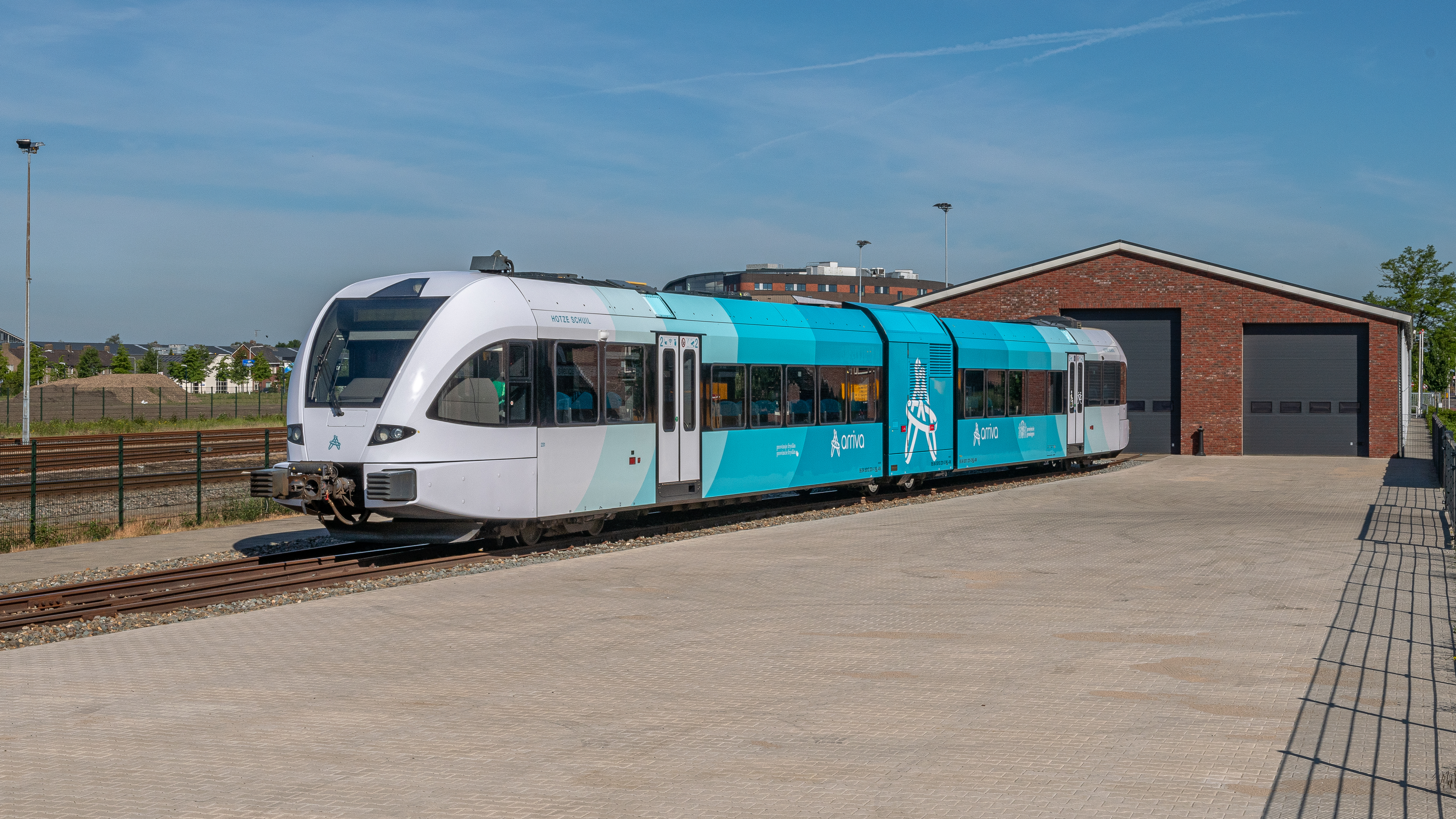 Het eerste Arriva (Noord) treinstel is klaar in een nieuwe uitstraling. De Arriva treinstellen in Noord-Nederland worden voorzien van een technische opknapbeurt en nieuwe livrei. De Stadler GTW stellen worden allereerst technisch gereviseerd bij Stadler in Blerick, waarna ze naar Winterswijk worden overgebracht voor een nieuwe outfit. Bij de werkplaats van Transit Oost staat het eerste stel, de 231 inmiddels buiten, terwijl de 327 is binnen genomen. Wanneer ook deze klaar is gaan ze samen, begin juni, terug naar het Noorden. Treinstel 231 op het terrein van Transit Oost in Winterswijk. More info, check this